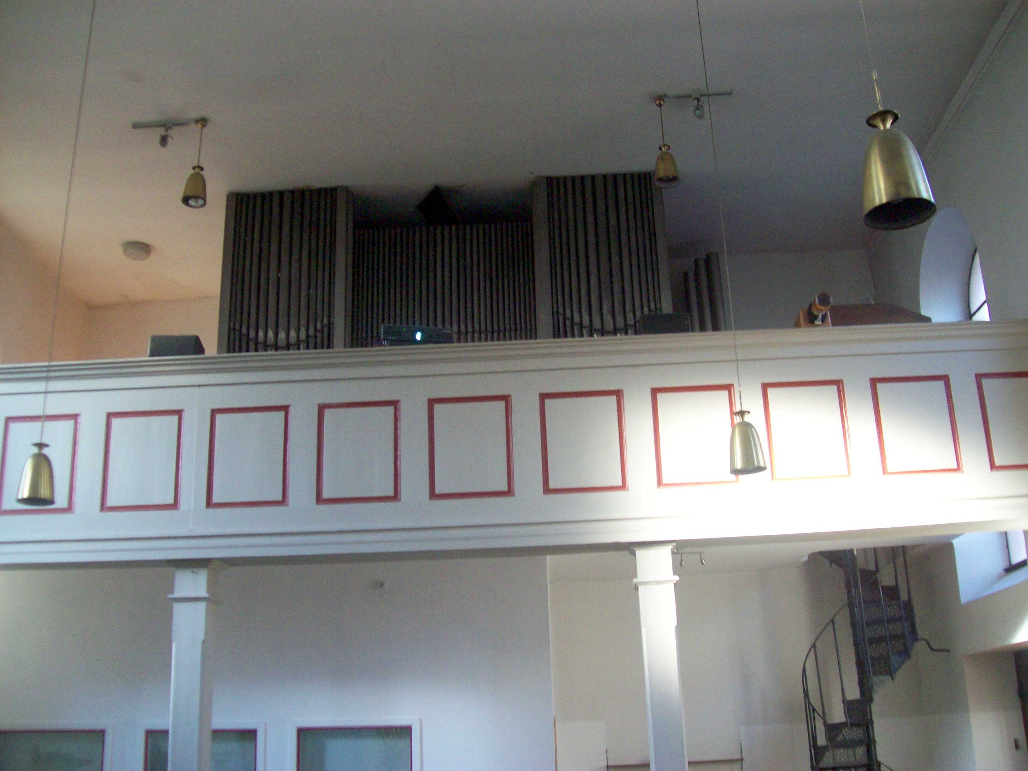 Spitalkirche St. Katharina am ehemaligen Städt. Krankenhaus Orgelempore